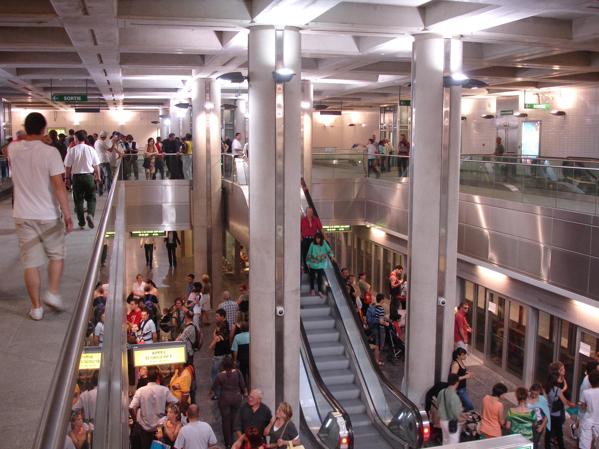 France, Haute-Garonne, métro de Toulouse, station Jean Jaurès.